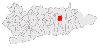 Categorie:Hărţi ale judeţului Călăraşi